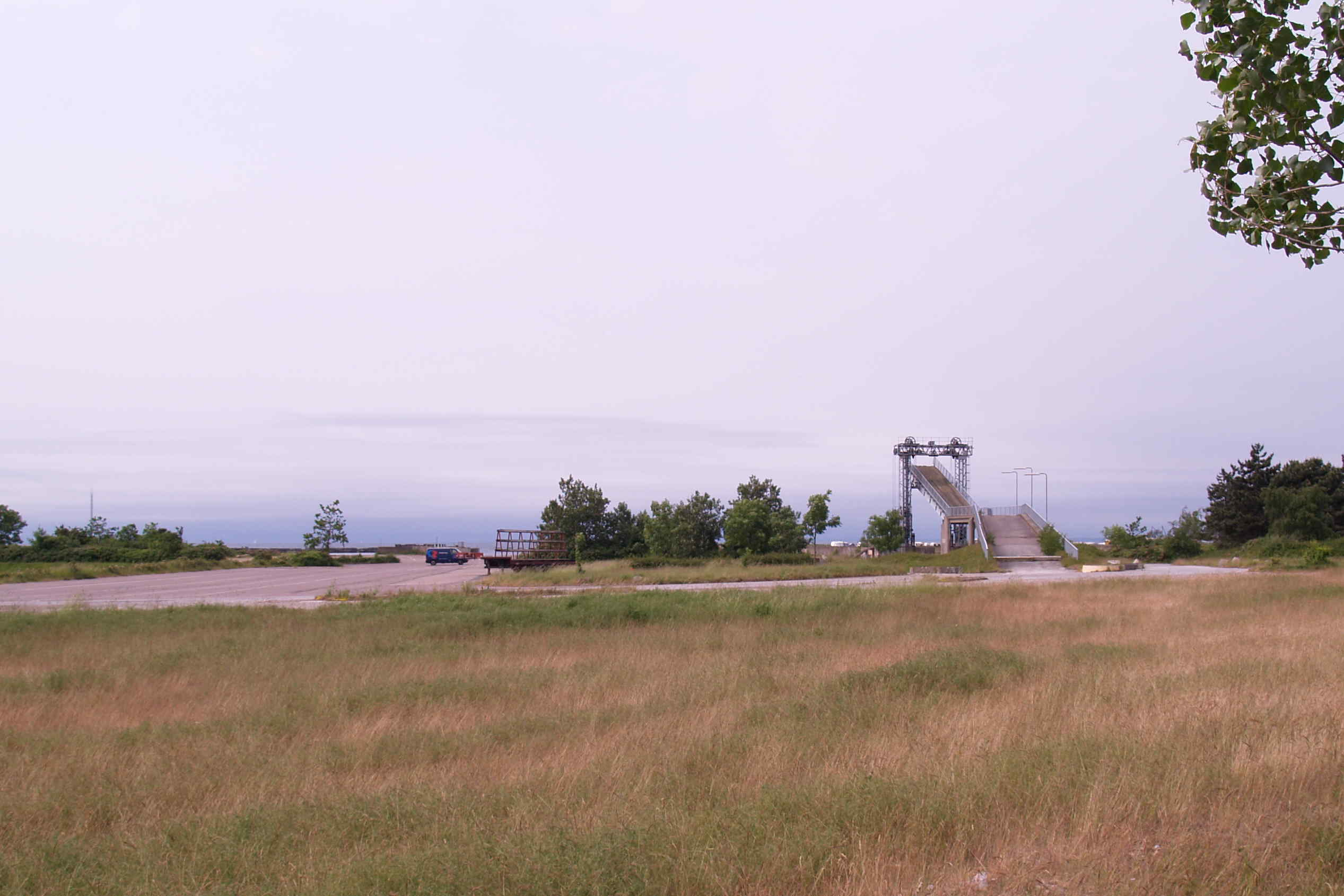 Halsskov Hafen alte Fähranlage